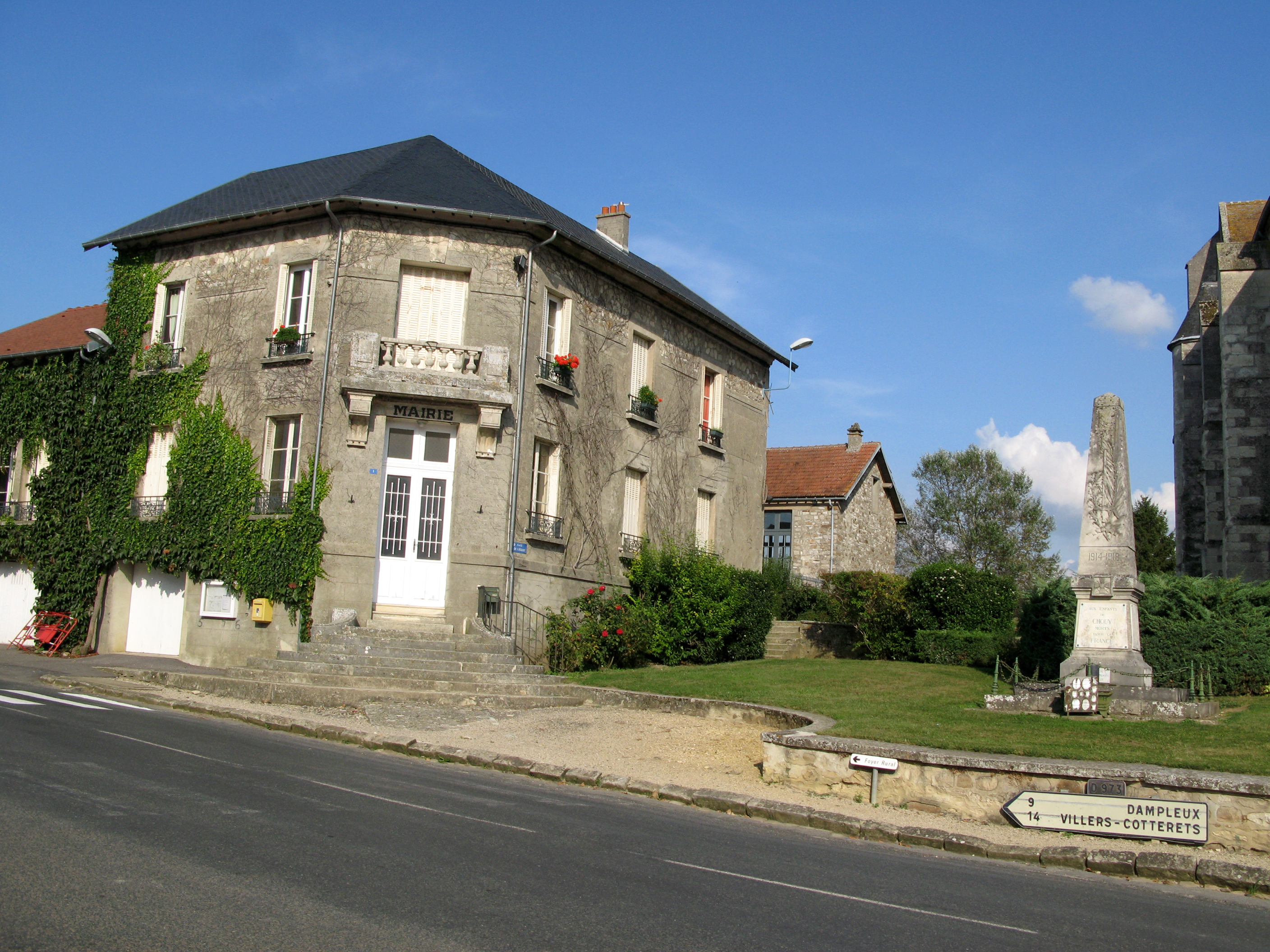 Chouy (Aisne, France) - La Mairie et Monument-aux-Morts se trouvent sur le côté gauche de l'église. . .